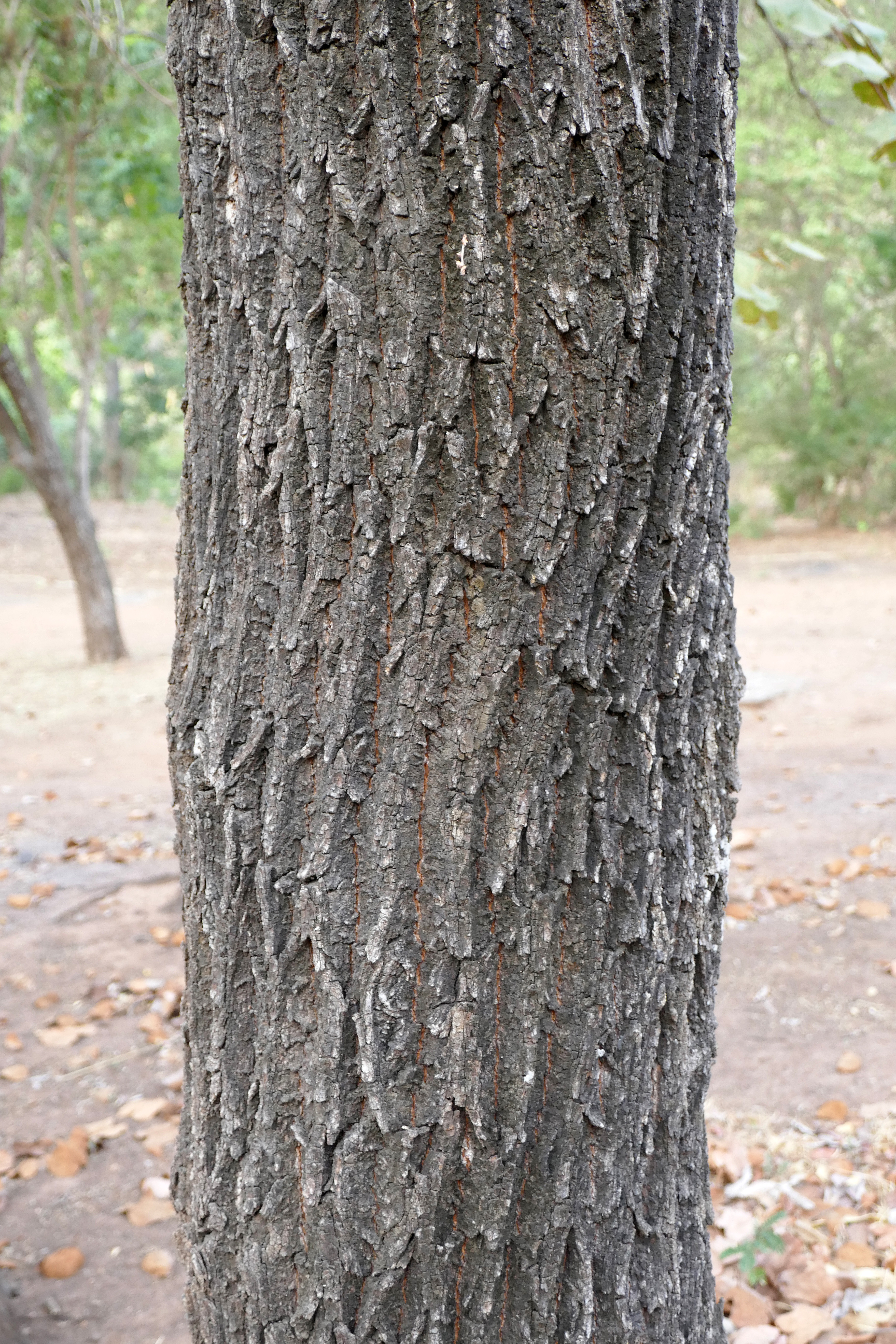 Terminalia macroptera dans le nord du Bénin, aux environs des chutes de Tanougou.